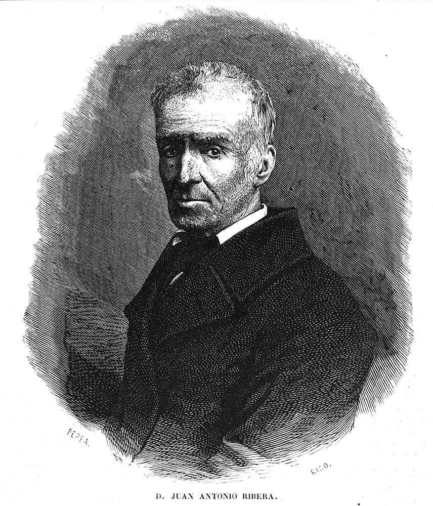 Retrato de Juan Antonio Ribera, en la revista española El Museo Universal.